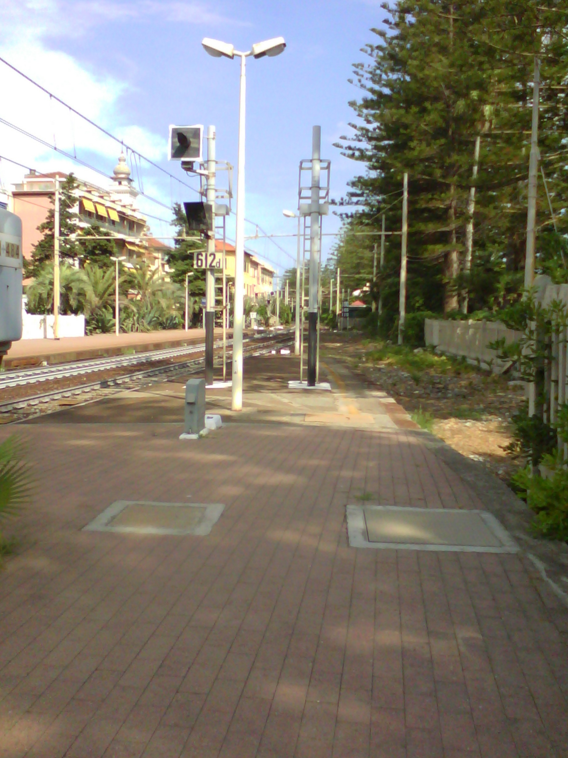 La stazione di Bordighera inquadrata da ponente verso levante